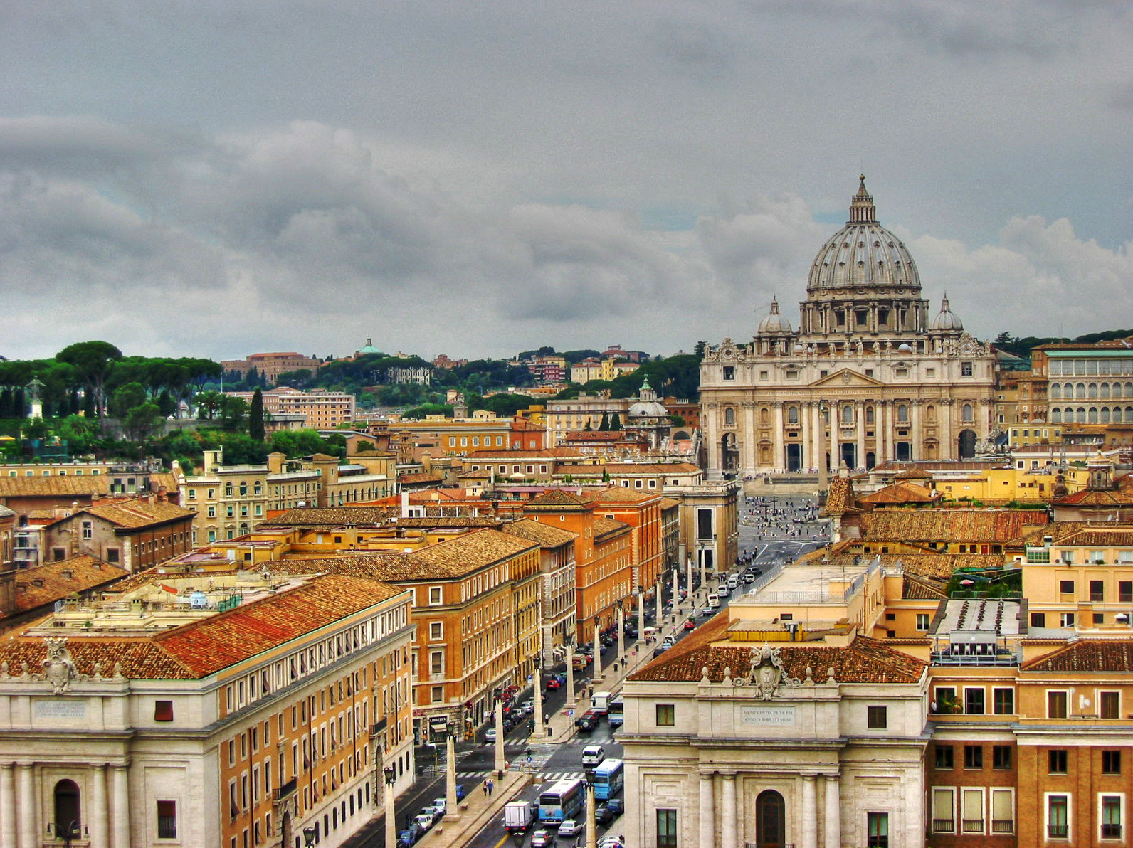 Via della Conciliazione a Roma, Lazio, Italia, vista dalla terrazza di Castel Sant'Angelo. Sullo sfondo, la Basilica di San Pietro.